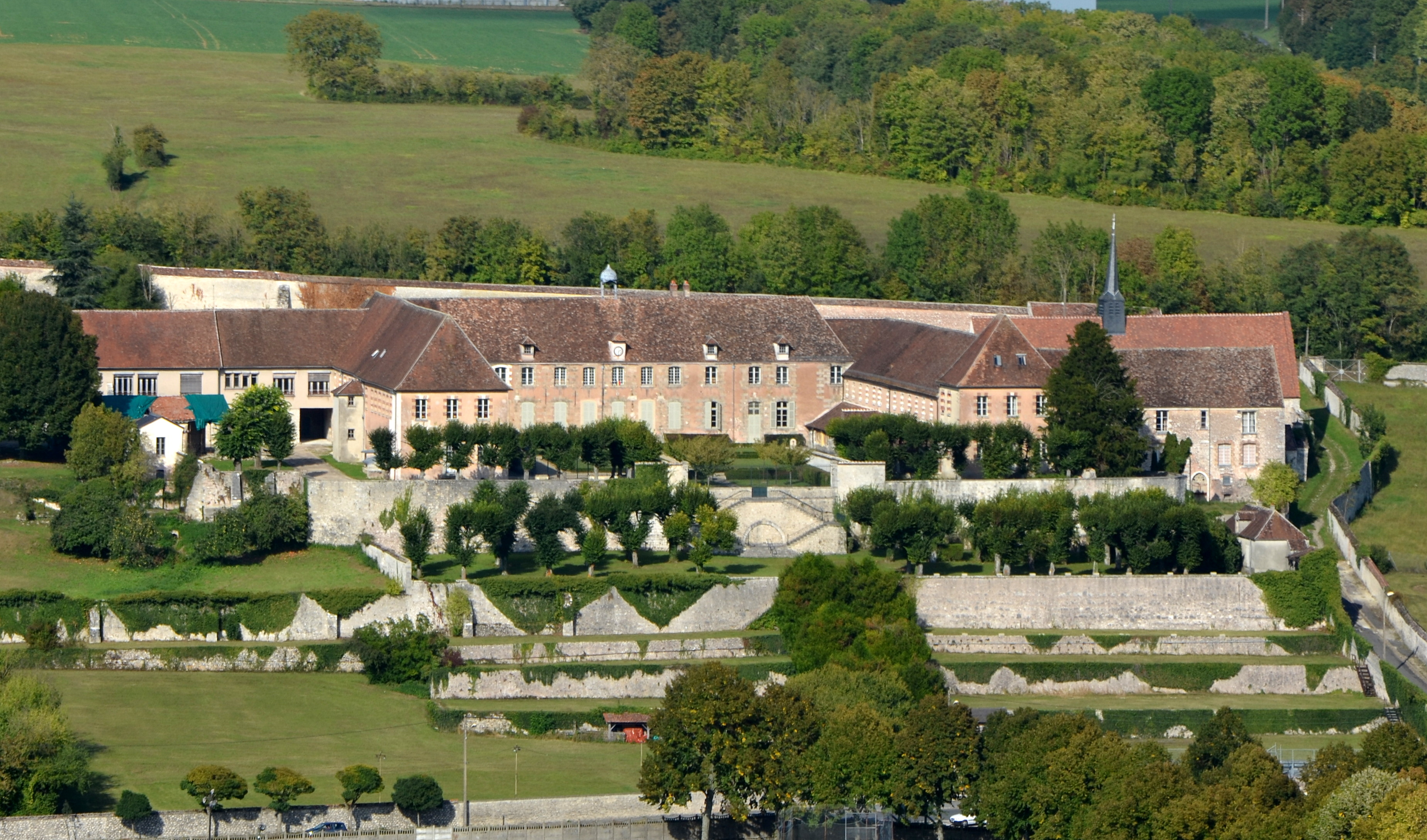 Couvent des Cordeliers a Provins (Seine et Marne, France) .